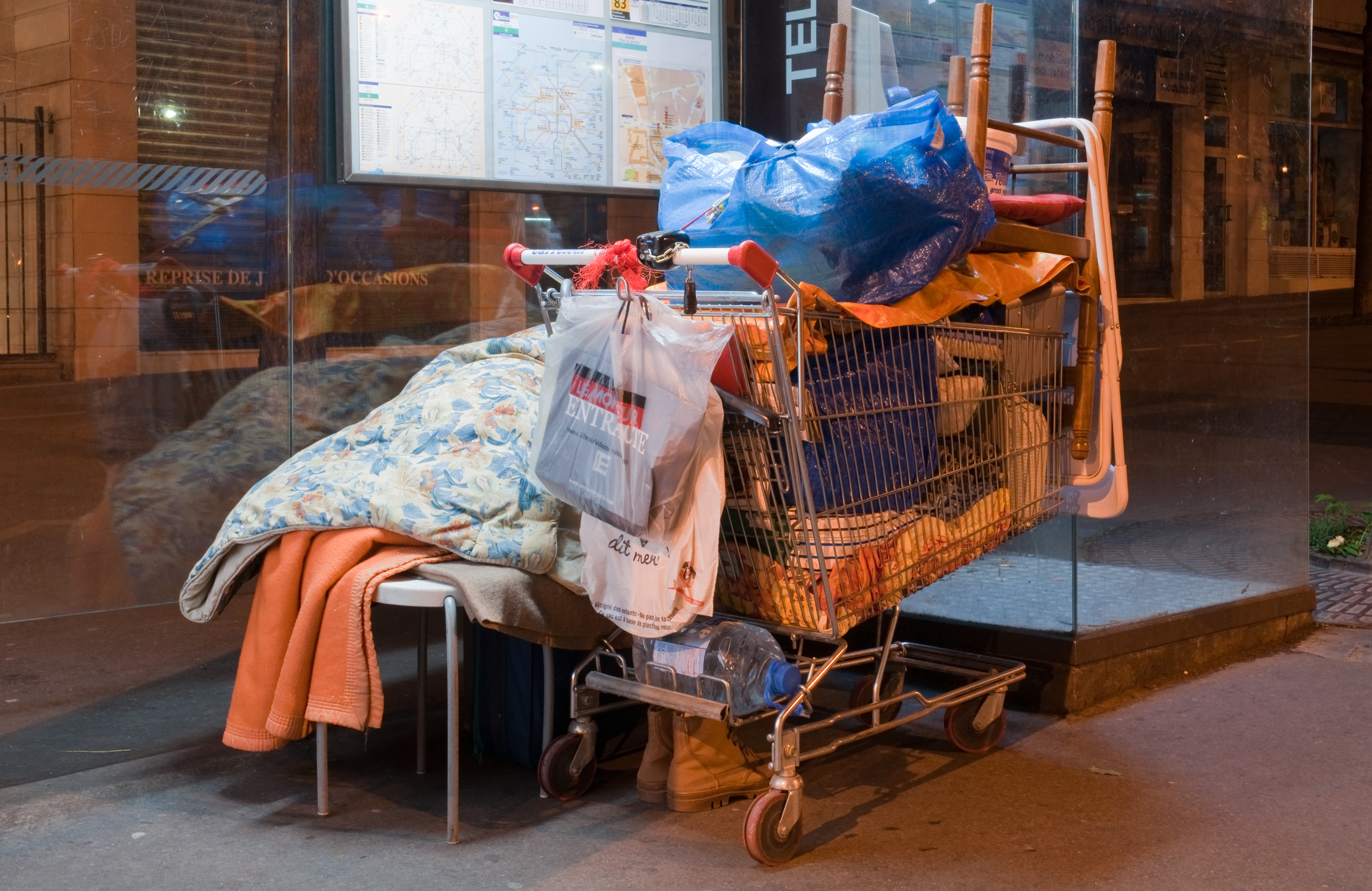 Clochard parisien sur l'avenue des Gobelins (Paris)